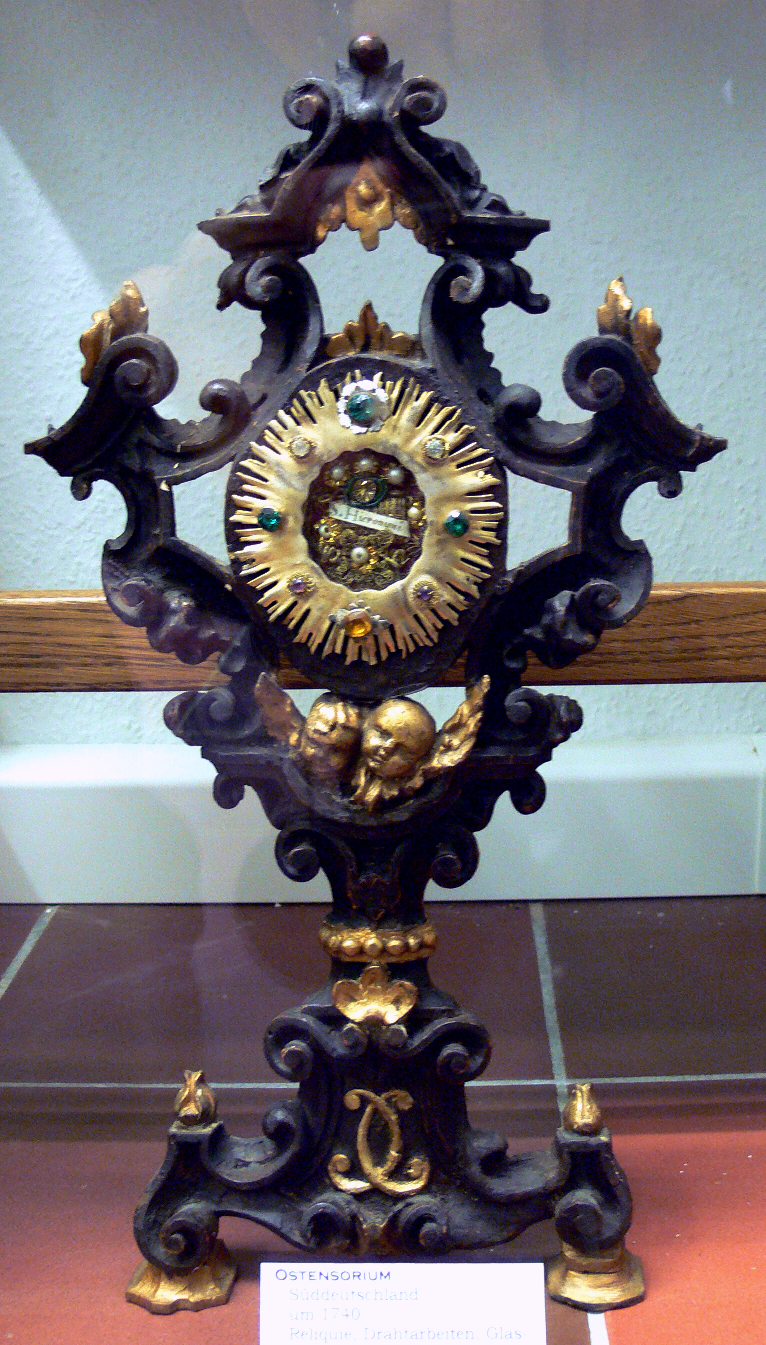 Weingarten, Museum für Klosterkultur Ostensorium, Süddeutschland um 1740 (Reliquie, Drahtarbeiten, Glassteine, Perlen, Silberblech vergoldet, Holz geschnitzt und gefasst)